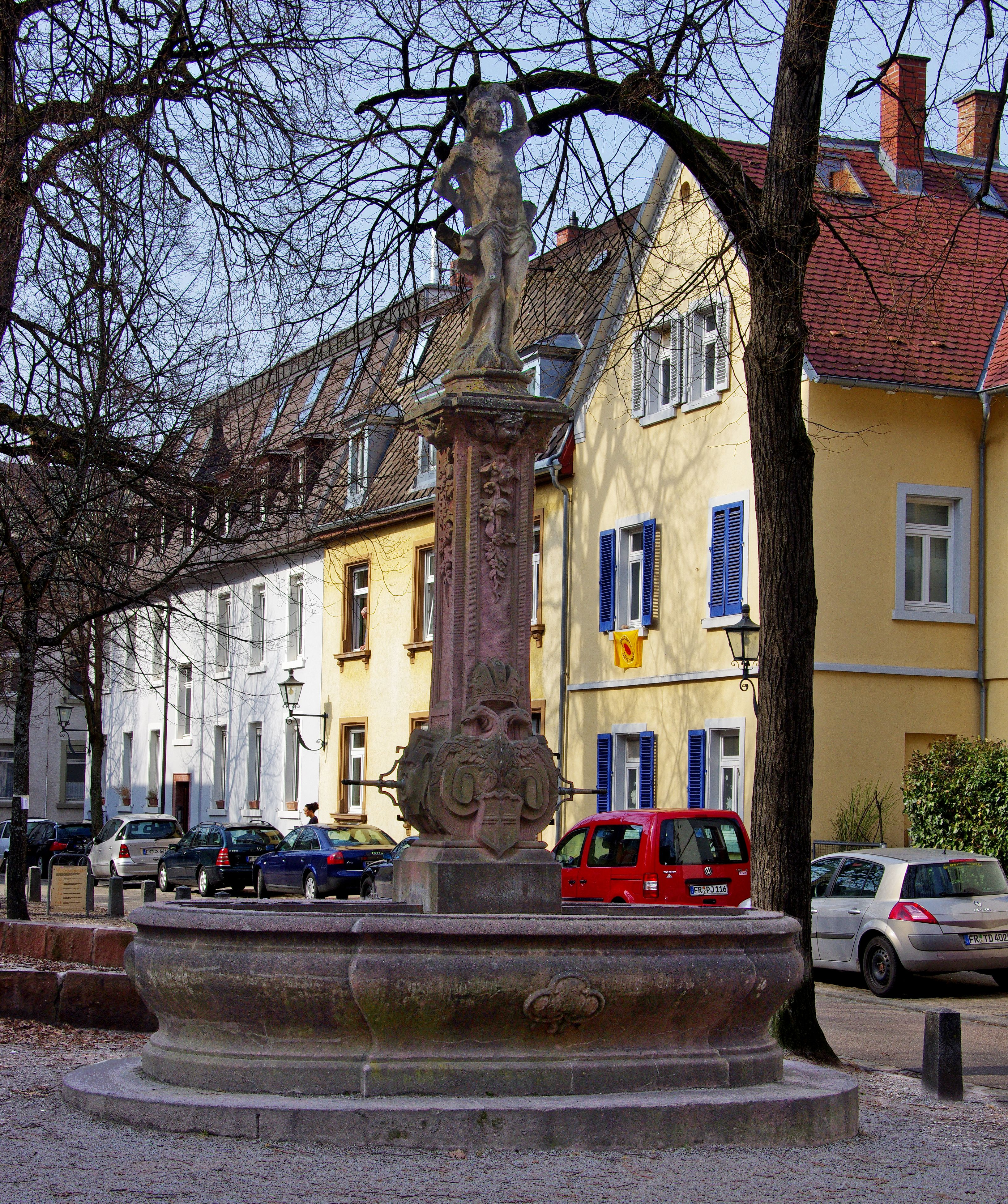 Sebastians-Brunnen bei St. Cyriak und Perpetua (Freiburg im Breisgau)